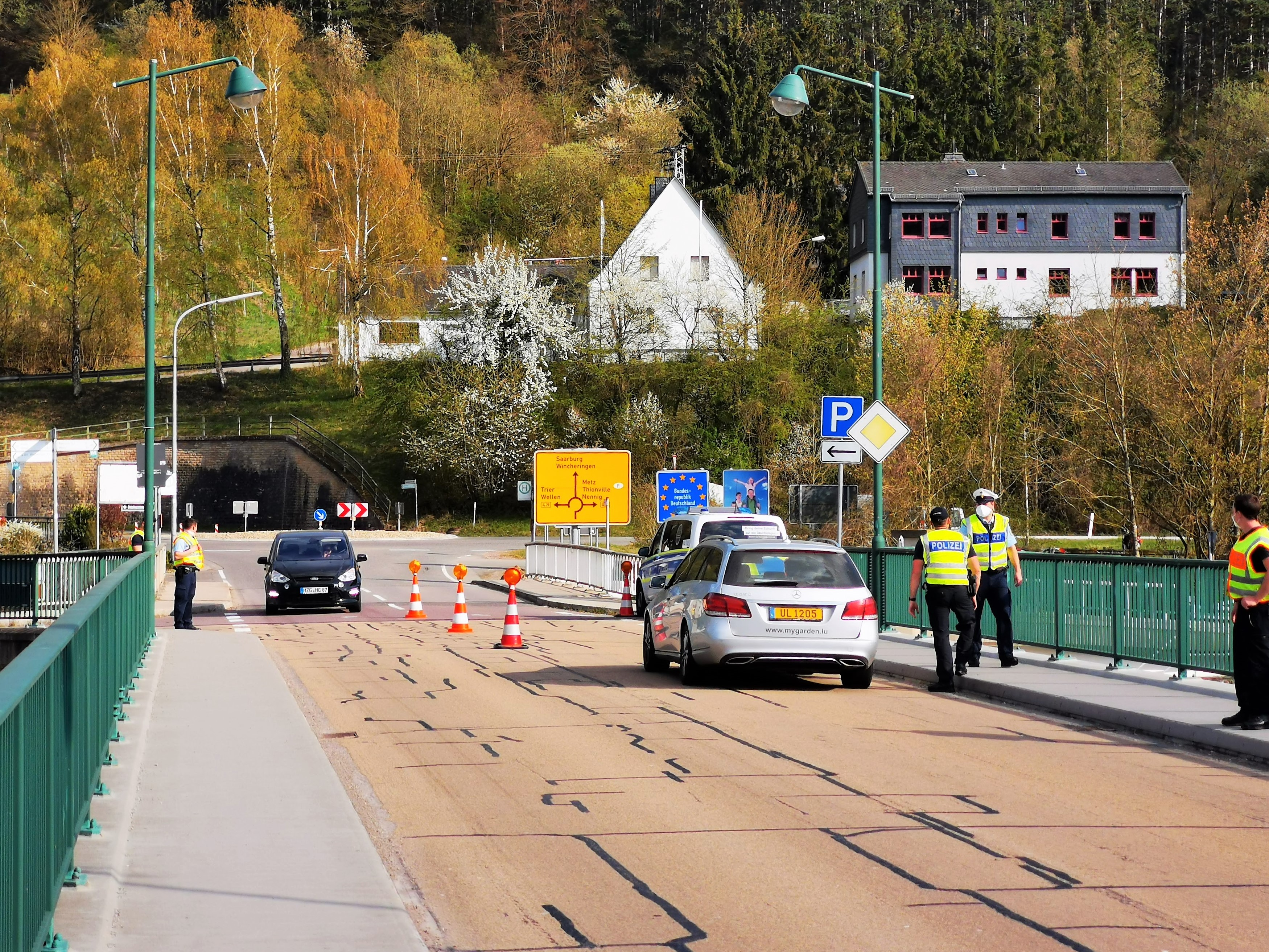 Wormeldange (L) - Wincheringen (D): contrôle de police à la frontière germano-luxembourgeoise en pleine pandémie de coronavirus (avril 2020).